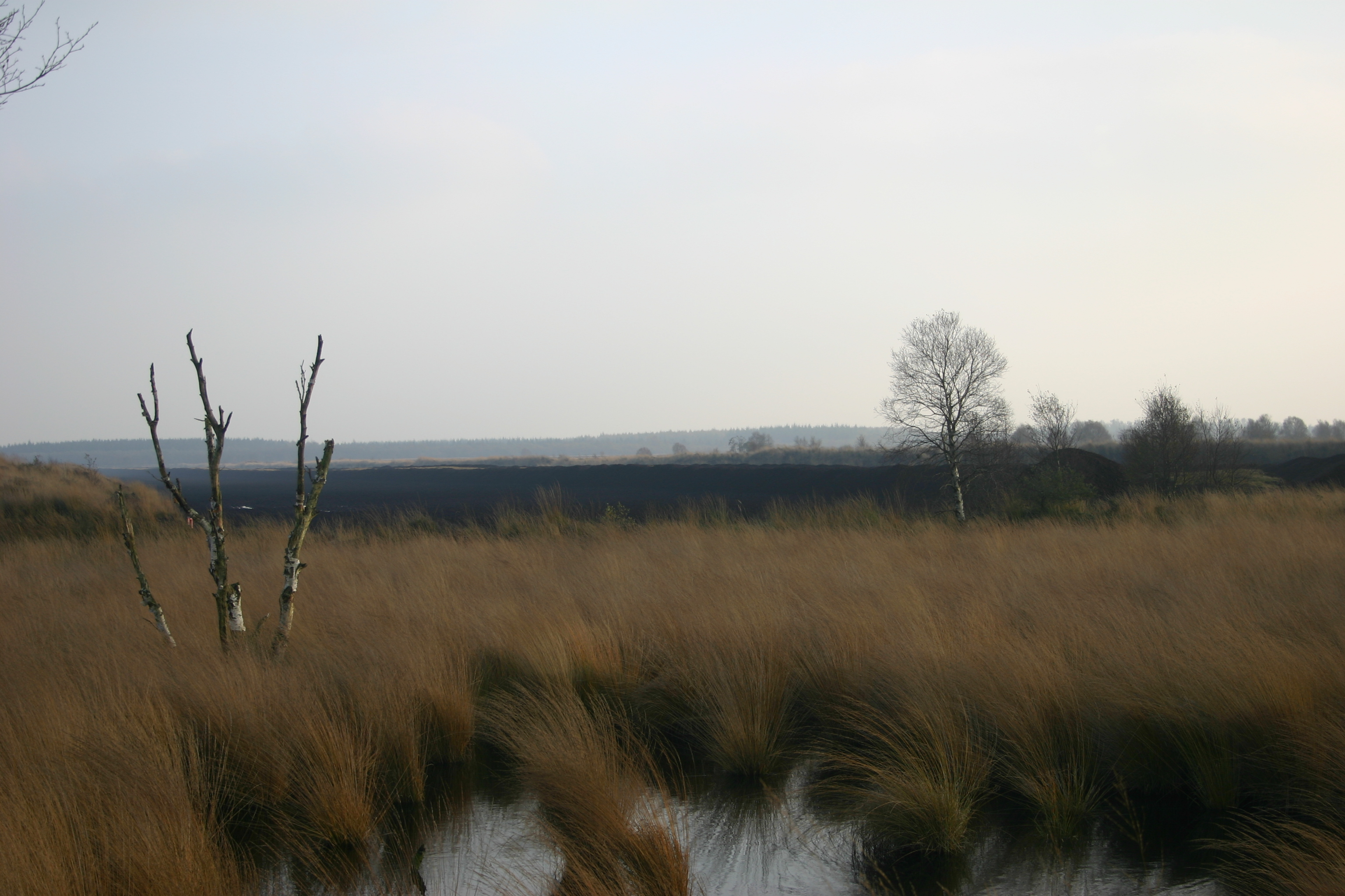 Berumerfehner Moor im Landkreis Aurich (Ostfriesland, Niedersachsen)